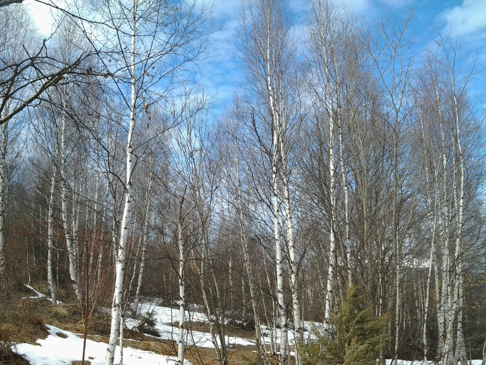 Mështekna në zonën e Shishtavecit